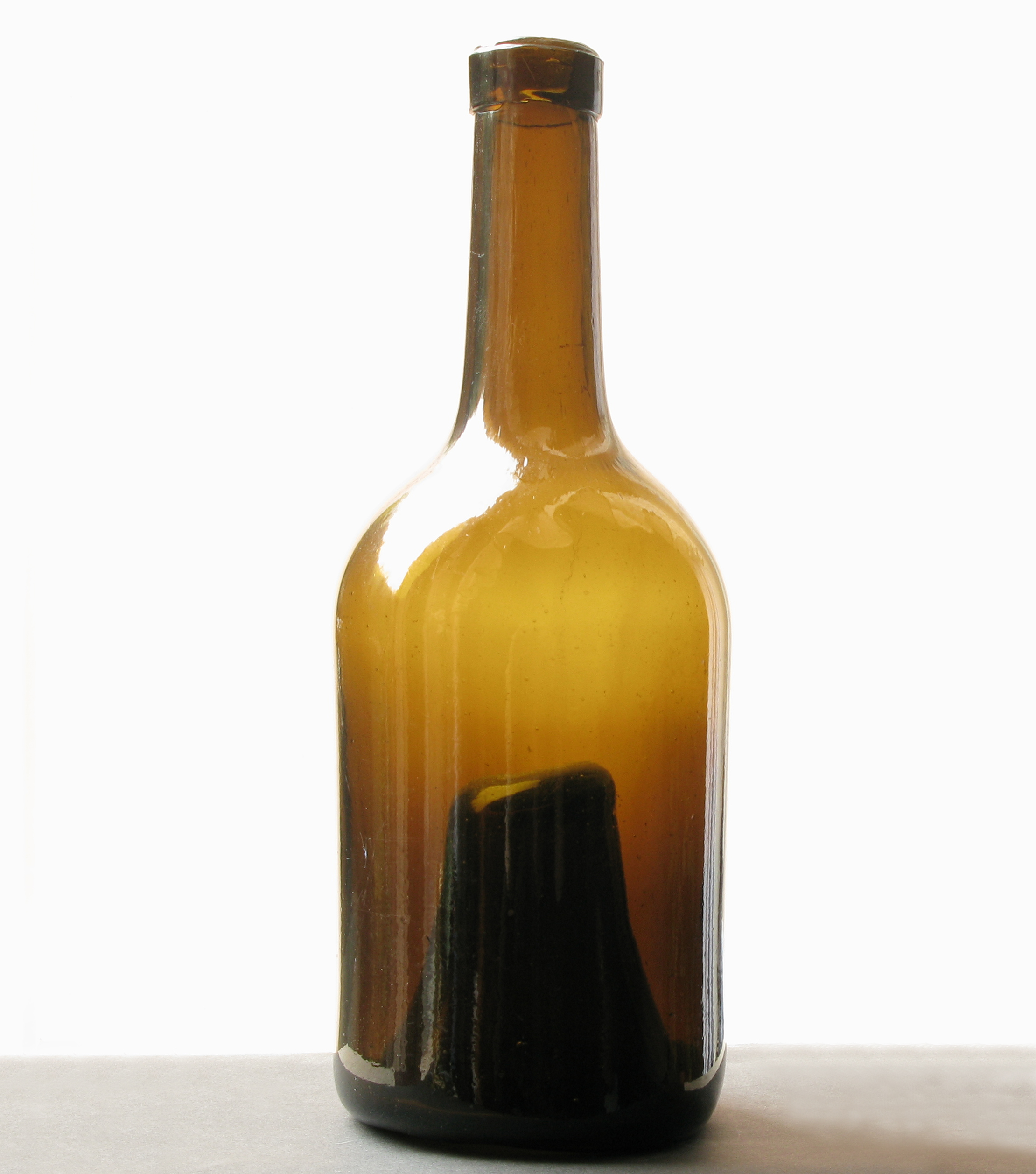 Weinflasche aus sogenanntem Waldglas, Frankreich, 1. Hälfte 19. Jahrhundert